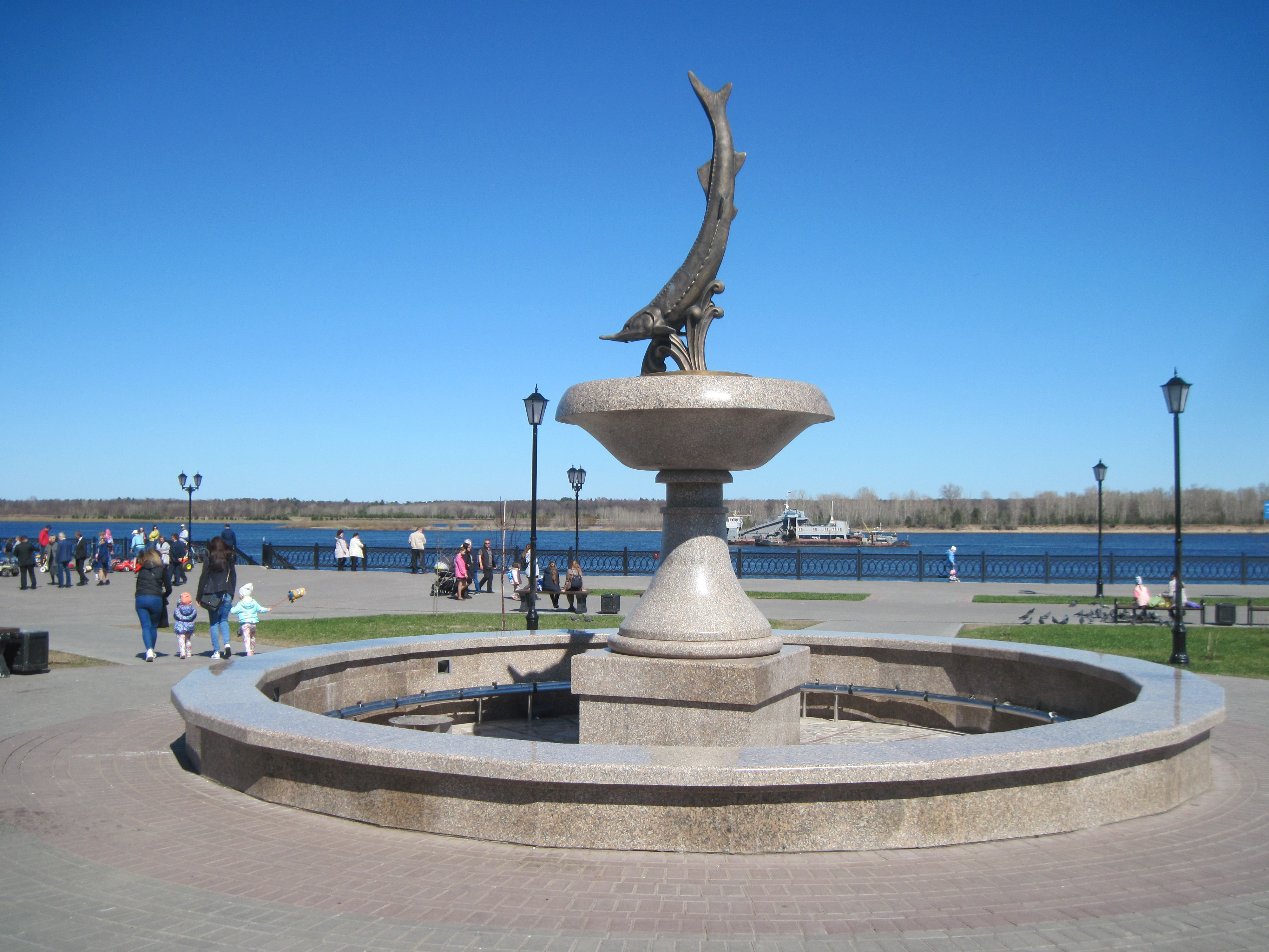 Город Сарапул,центральная набережная.